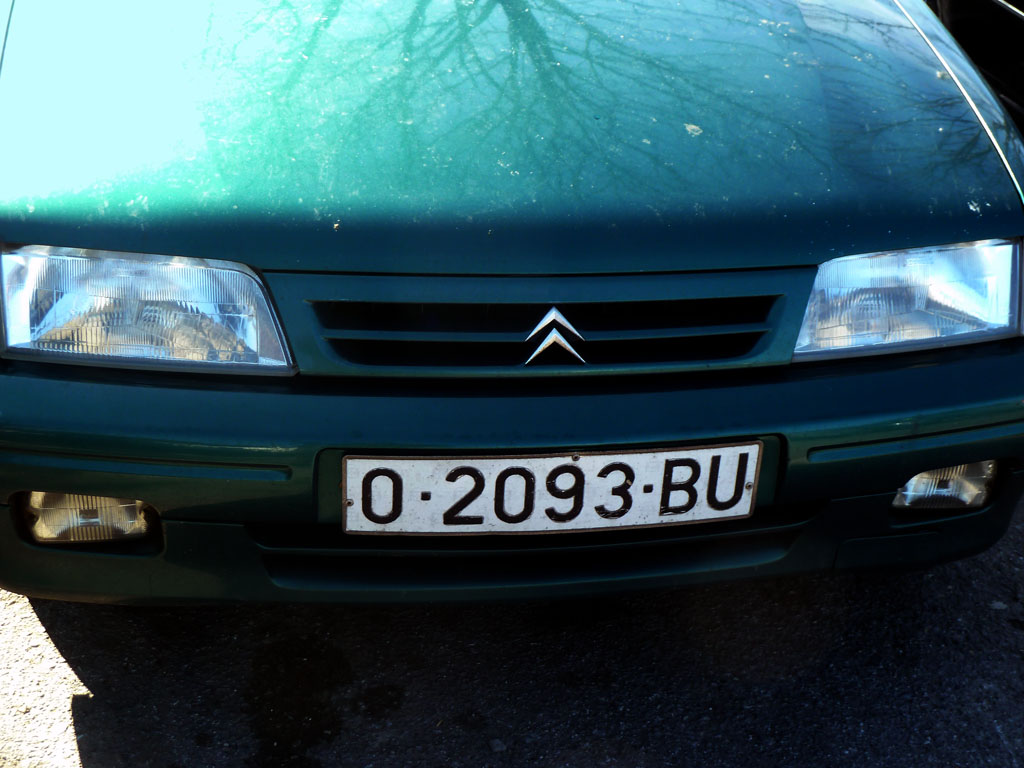 Citroën España